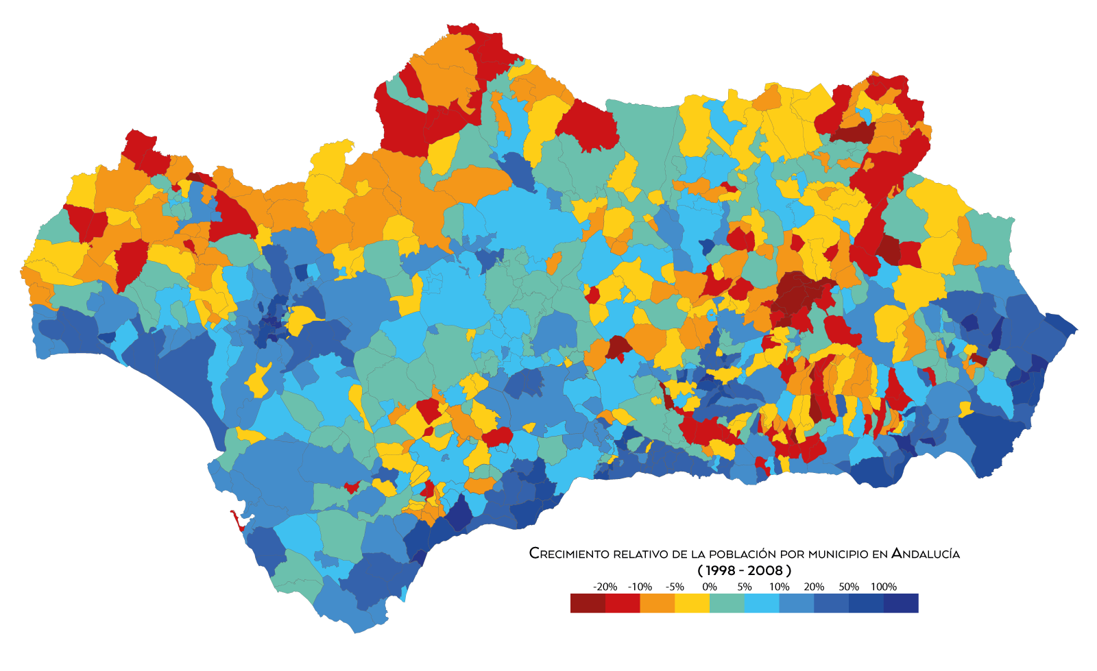 Crecimiento de la población por municipio en Andalucía entre los años 1998 y 2008